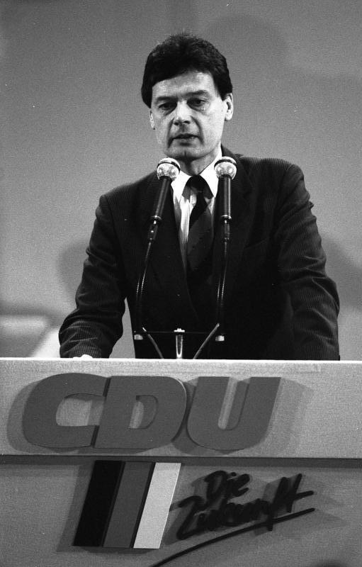 9.11.1987 35. Bundesparteitag der CDU in der Beethovenhalle, Bonn